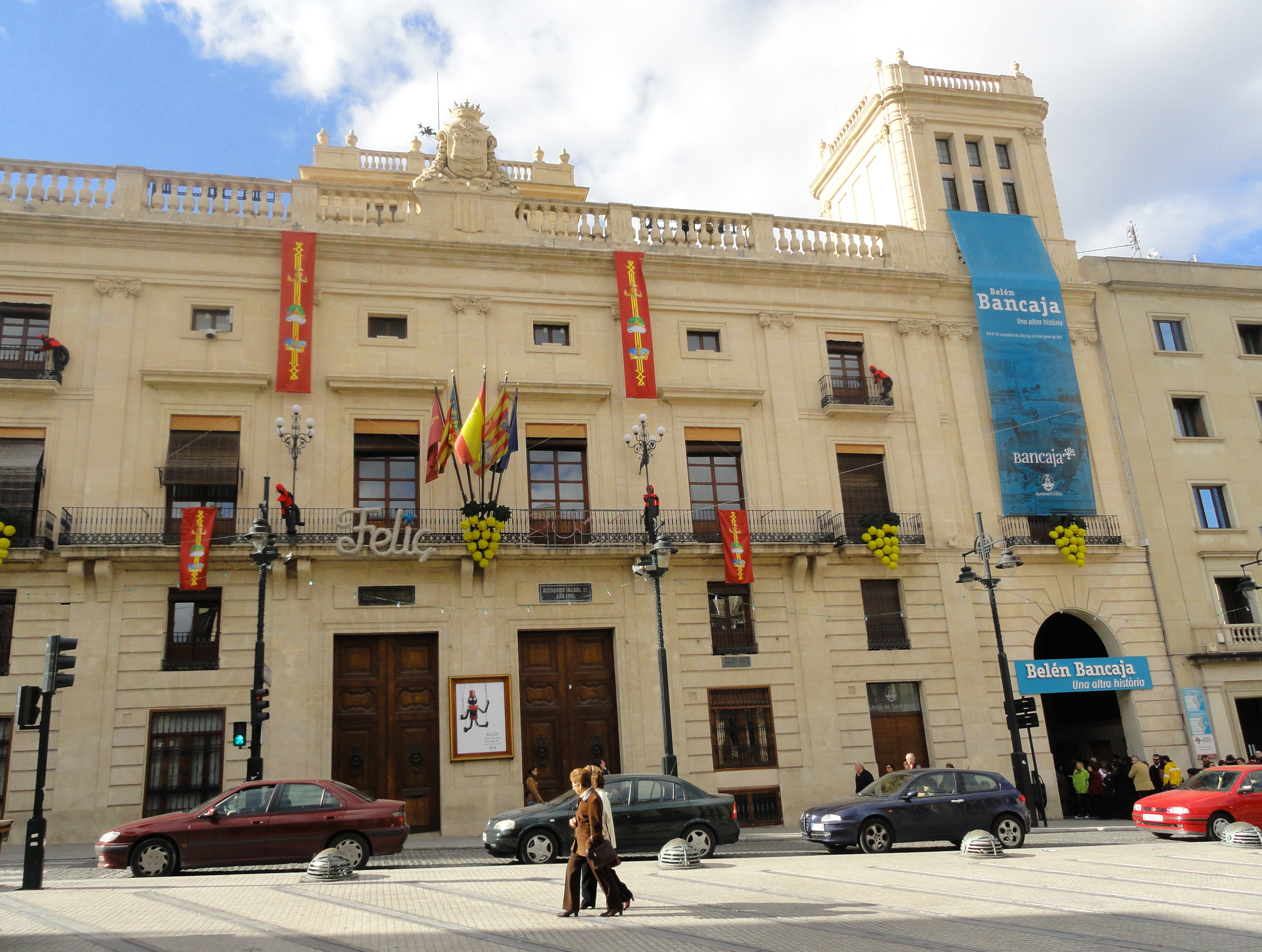 Edificio del Ayuntamiento (Casa Consistorial) de Alcoy, Plaza de España, construido entre 1846 y 1863.